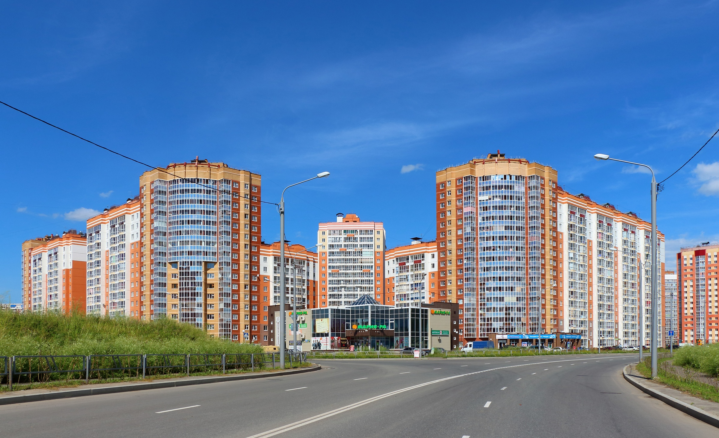 Микрорайон "Подсолнухи", Томск.